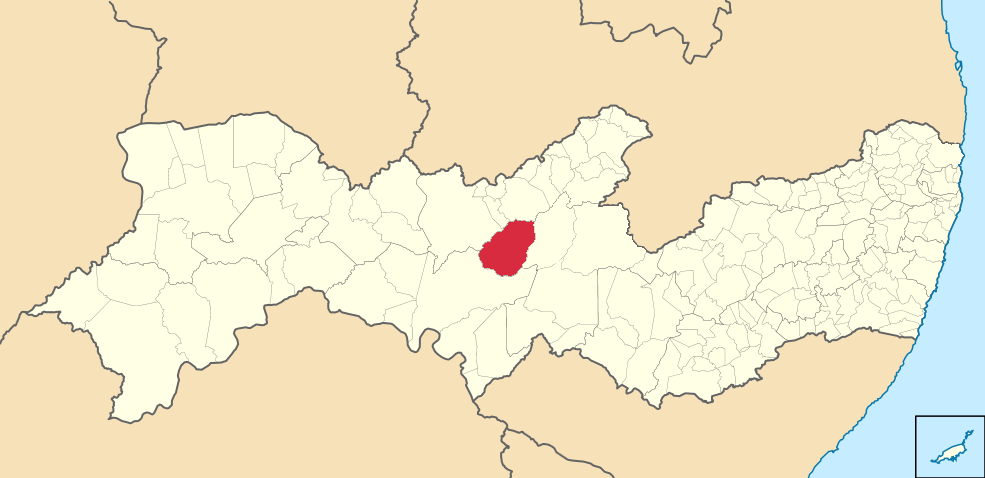 Mapa de Betânia (2)